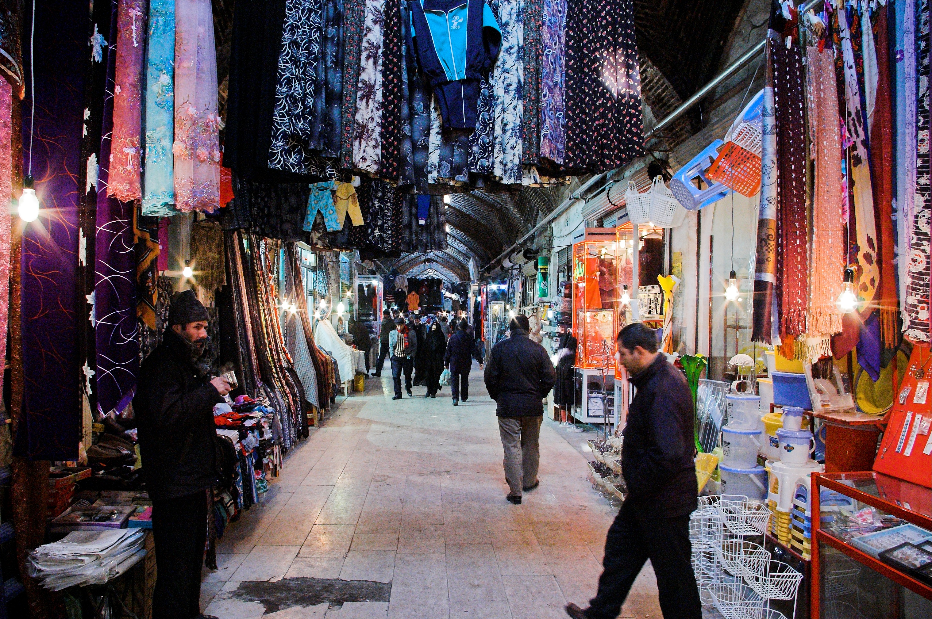 Khoy Bazaar.